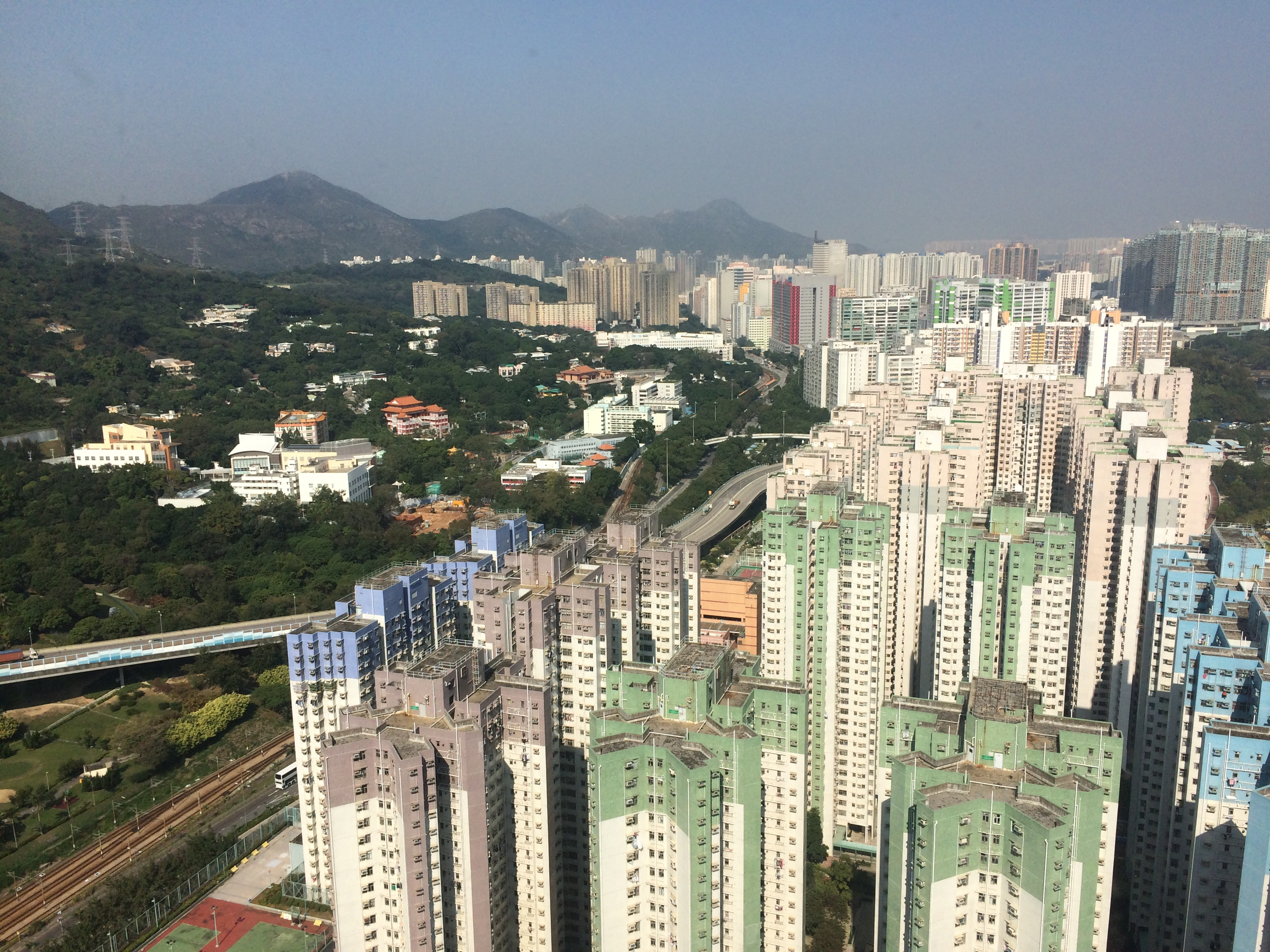 住宅北面景觀（可遠望天水圍、深圳市）